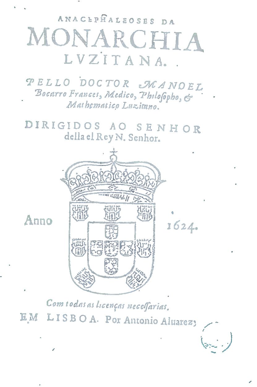 Titelblatt der astronomisch-messianischen Schrift Anacephaleoses da Monarchia Luzitana von Manuel Bocarro-Rosales